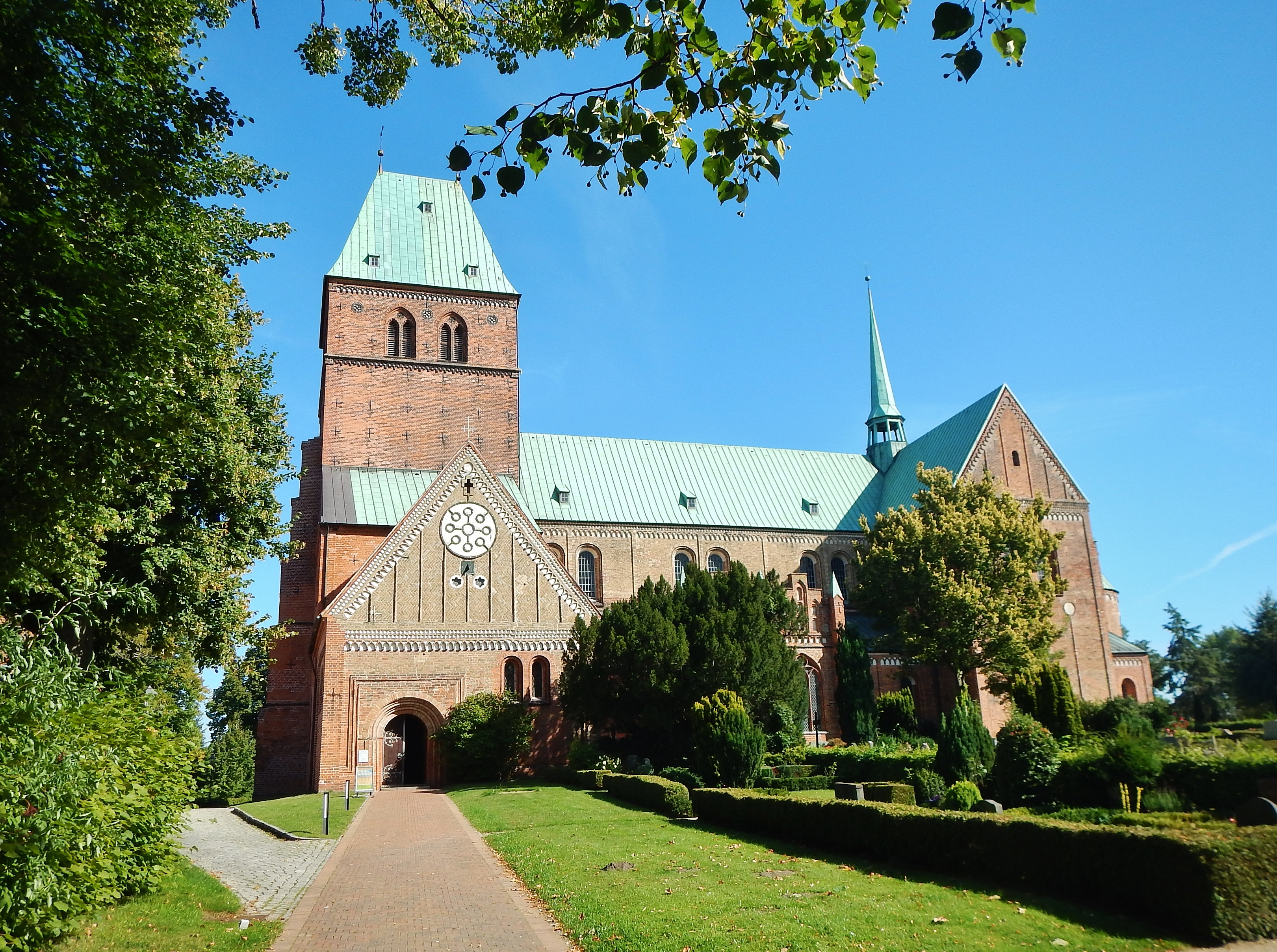 Ratzeburger Dom